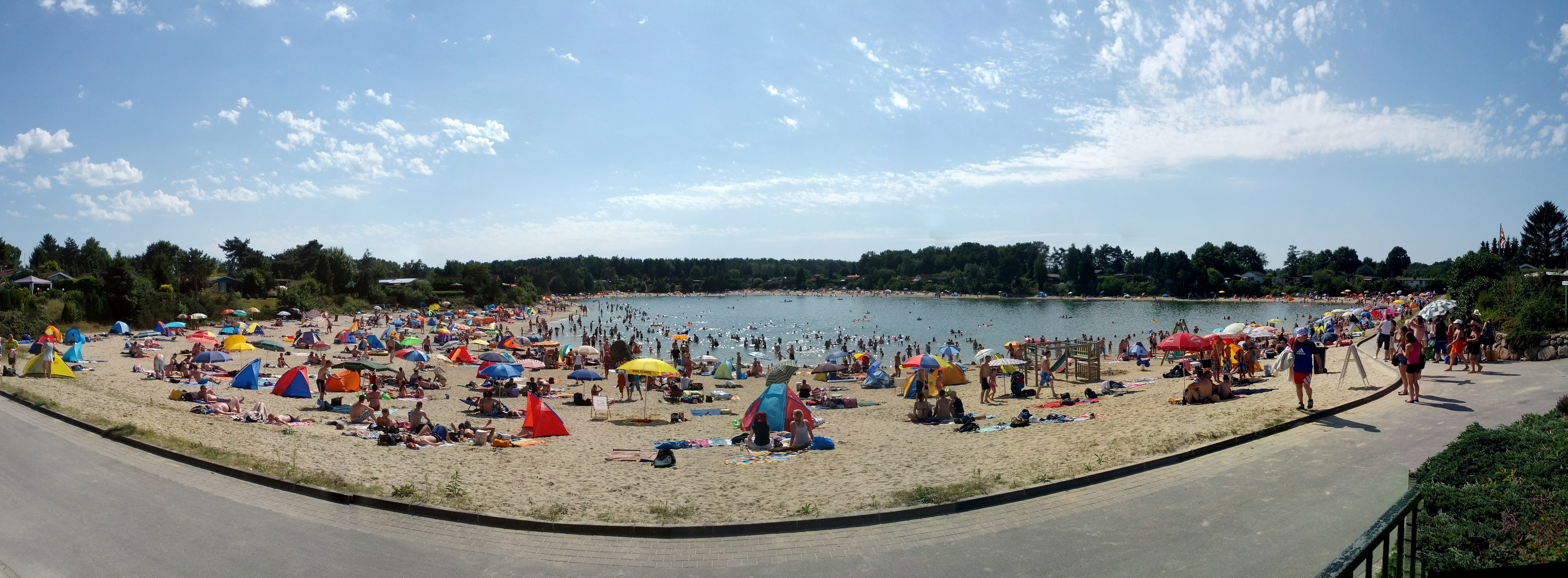 Panorama des Stedener Sees an einem heißen und gut besuchten Sommertag 2012. Aufgenommen mit Blick von der DLRG-Wachstation auf den See.